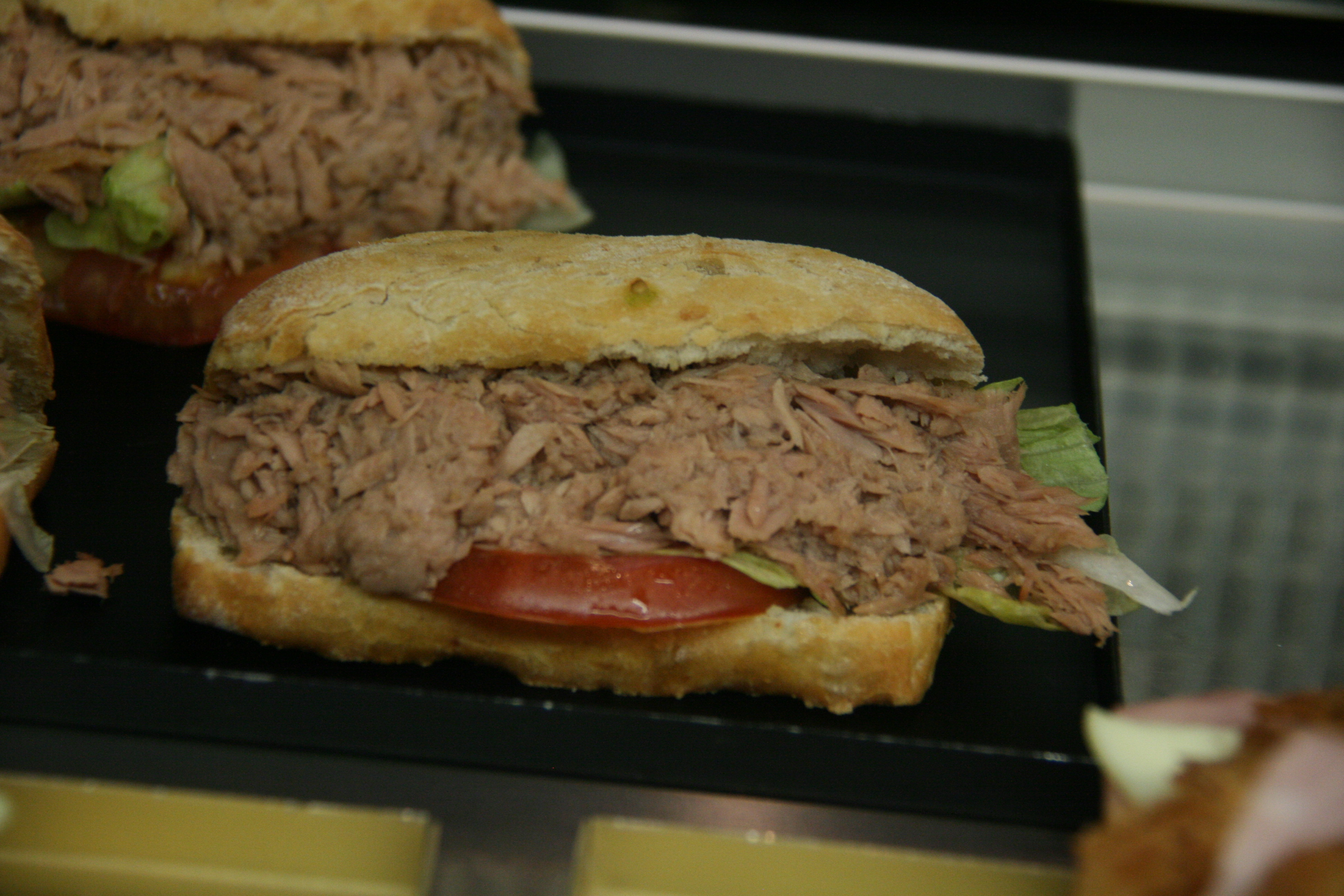 Bocadillo de migas de atun